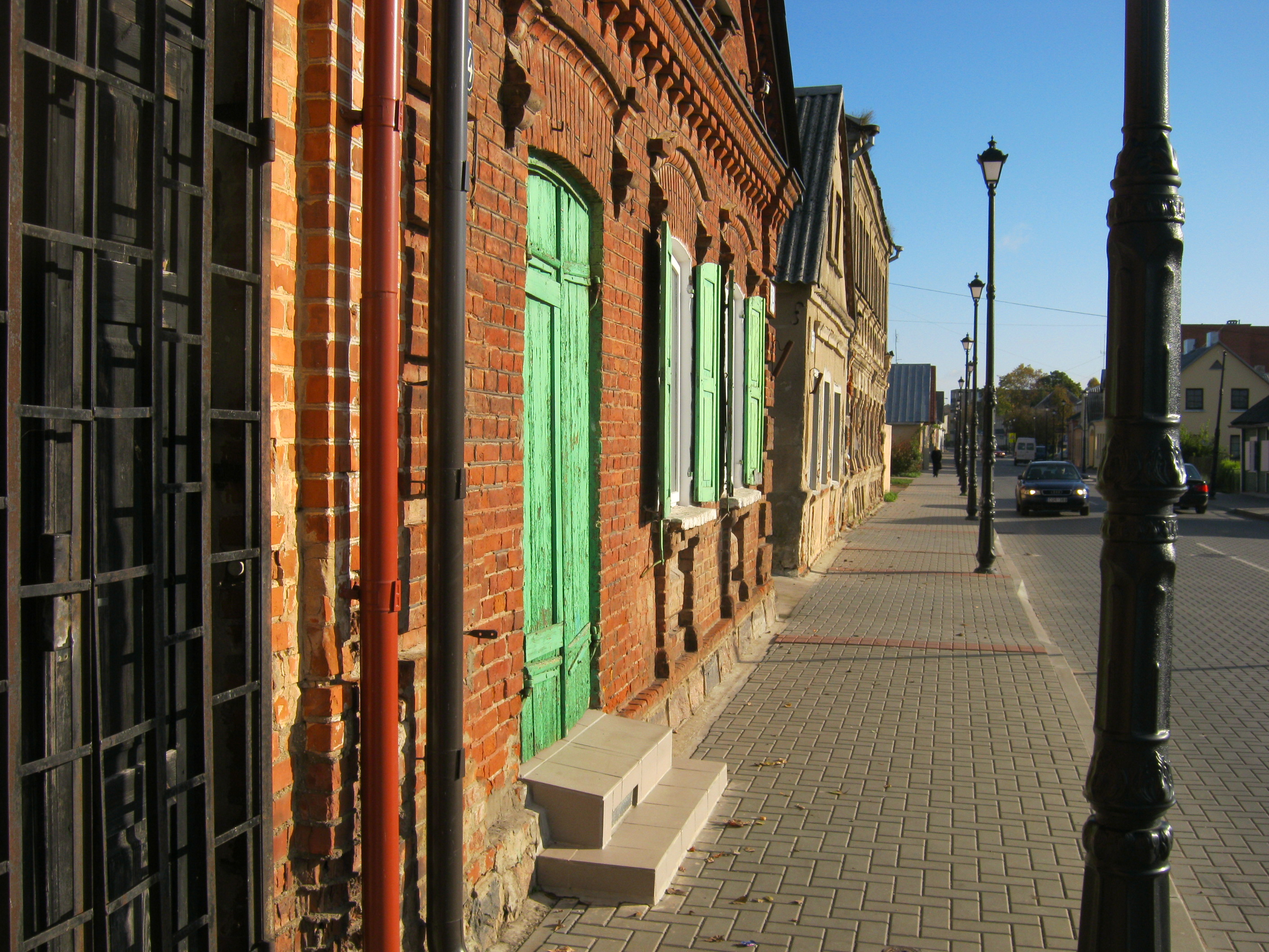 Jonava